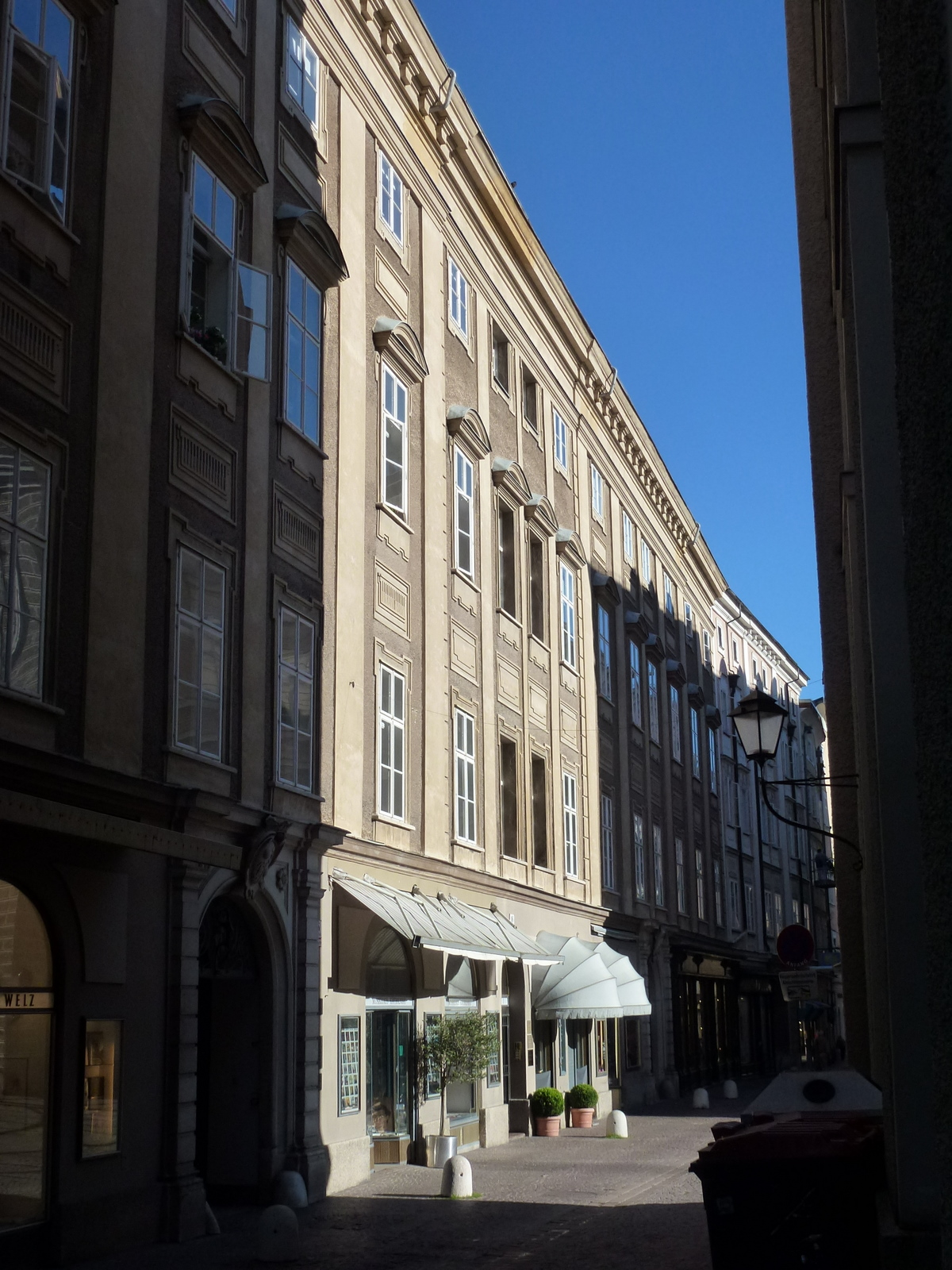 Stadtpalais, Langenhof